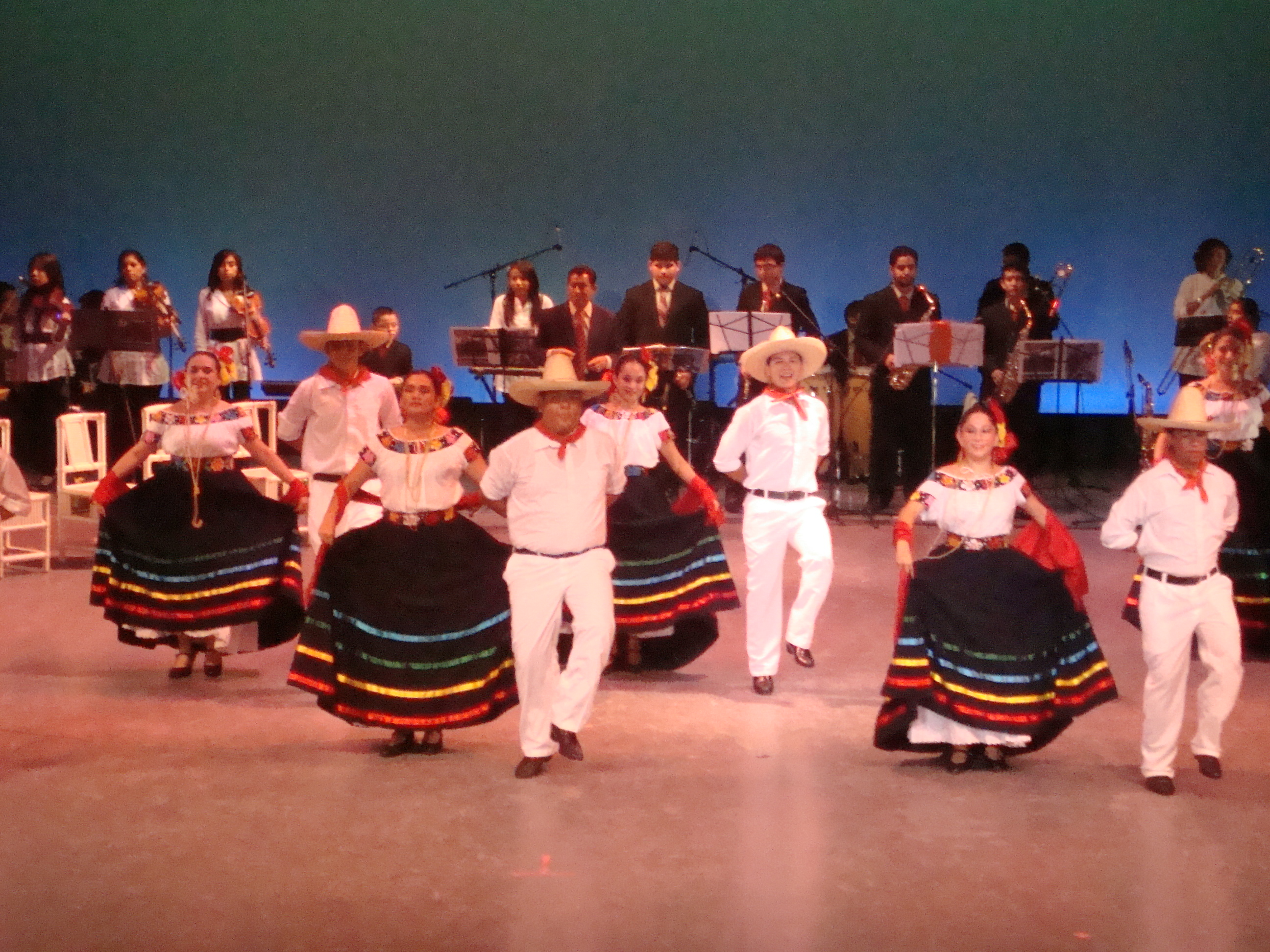 Bailarines de "Zapateo", el baile regional del estado de Tabasco, México.